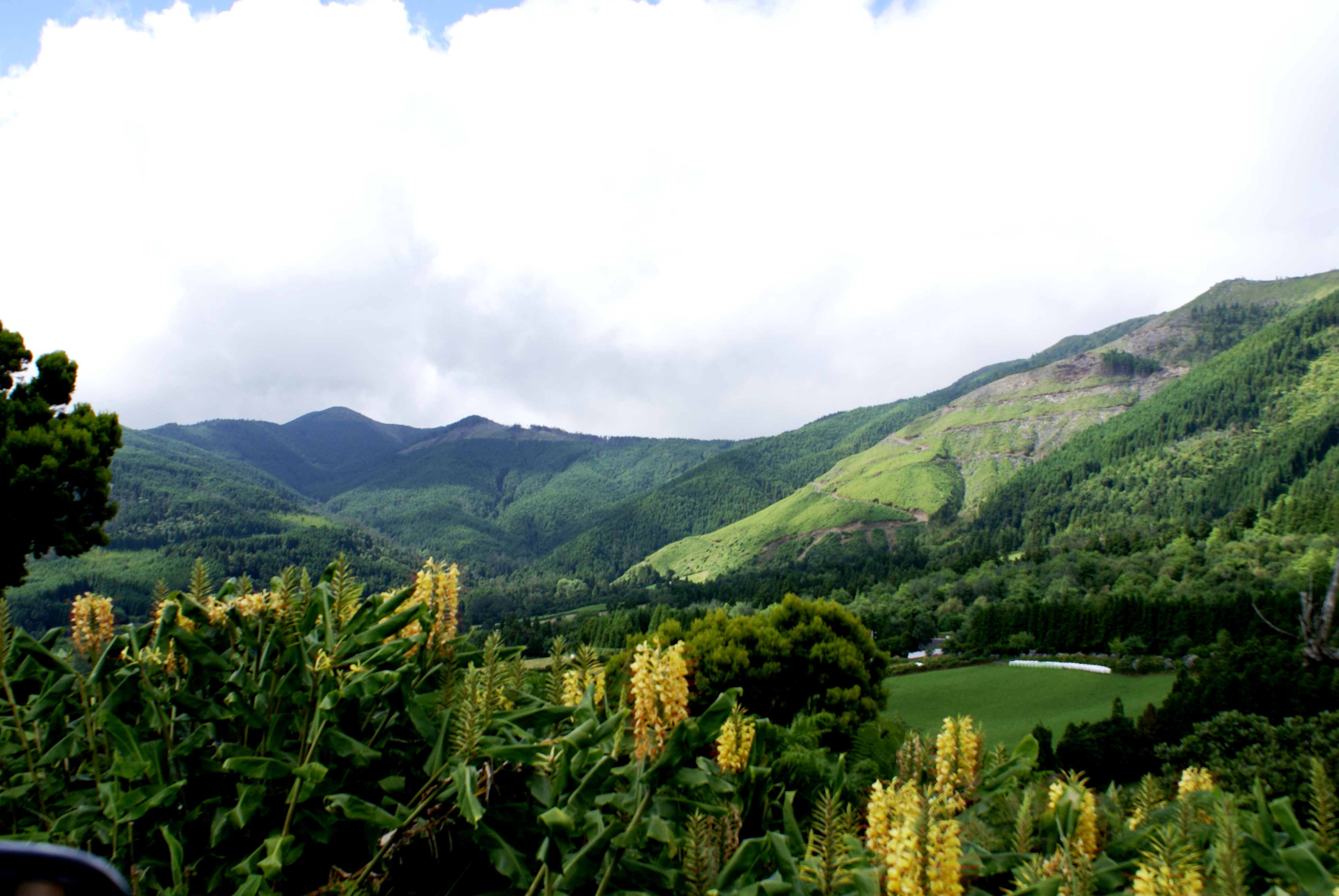 Miradouro do Pico Bartolomeu, ilha de São Miguel, Açores